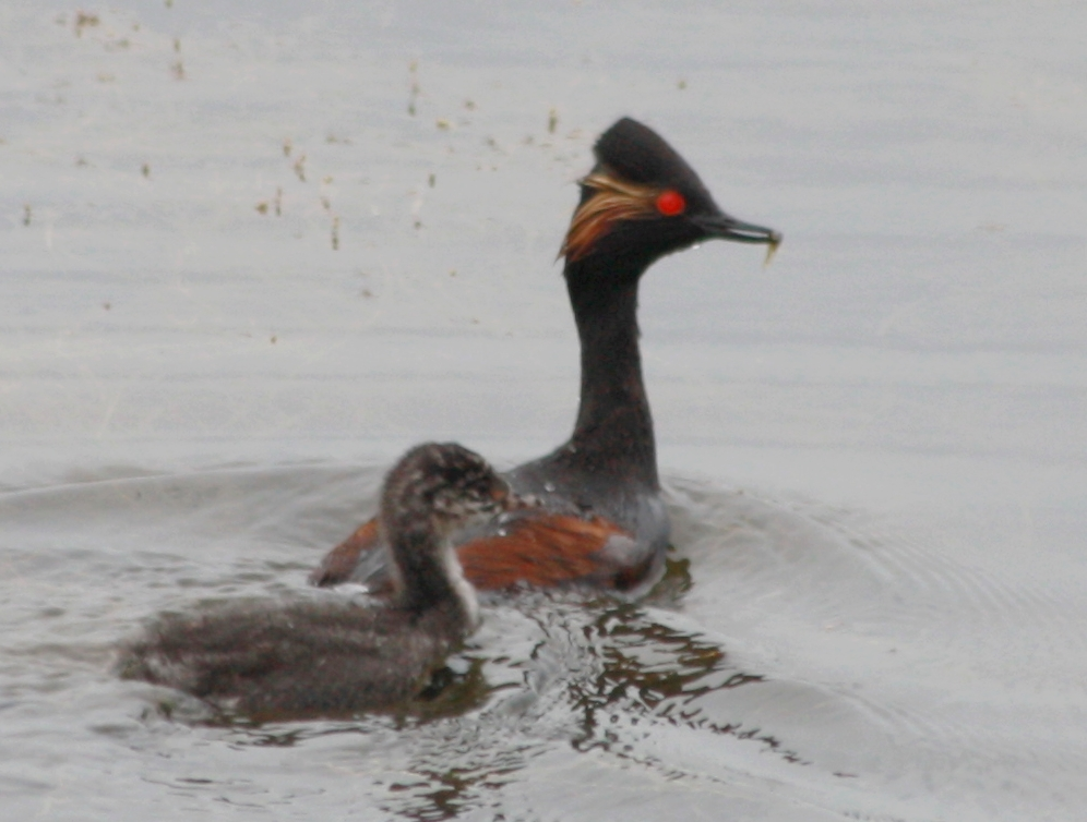 Grèbe à cou noir Podiceps nigricollis Black-necked Grebe